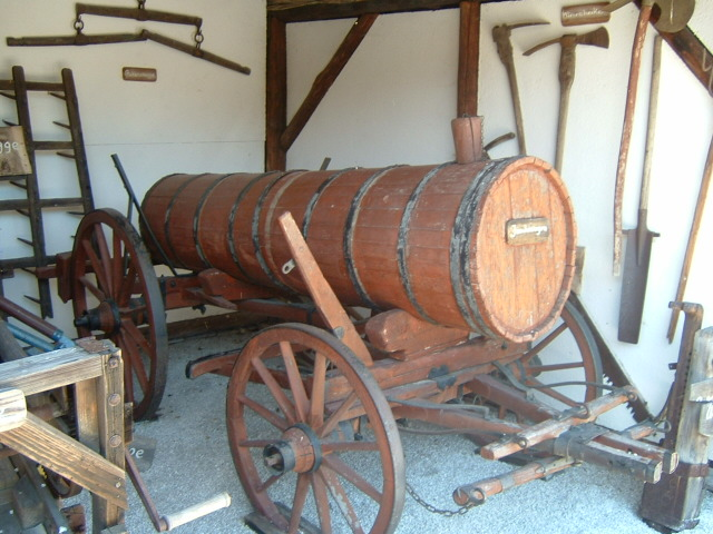 Güllefass, Ausstellung Freizeitpark Lochmühle bei Wehrheim